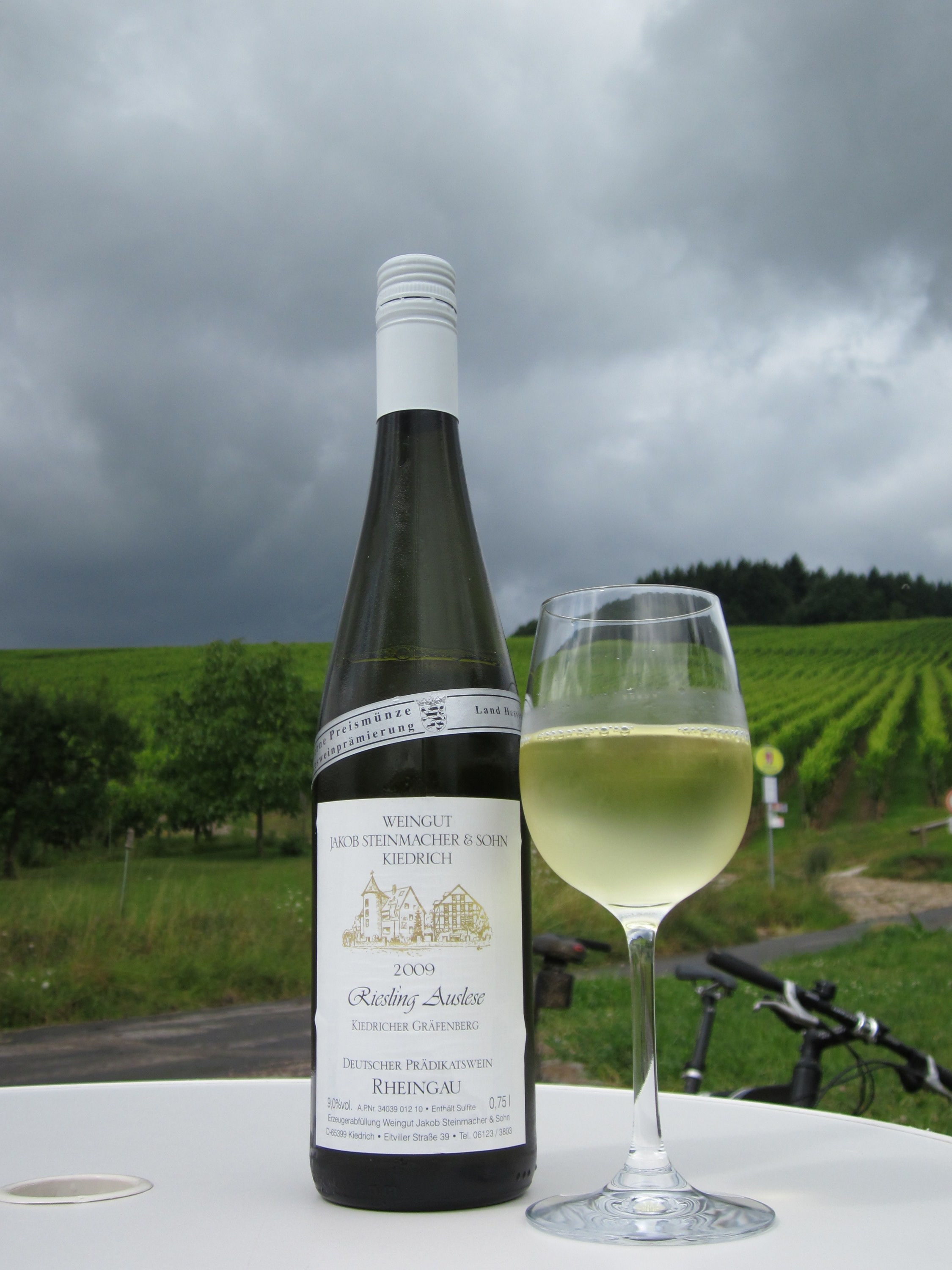 Kiedricher Gräfenberg